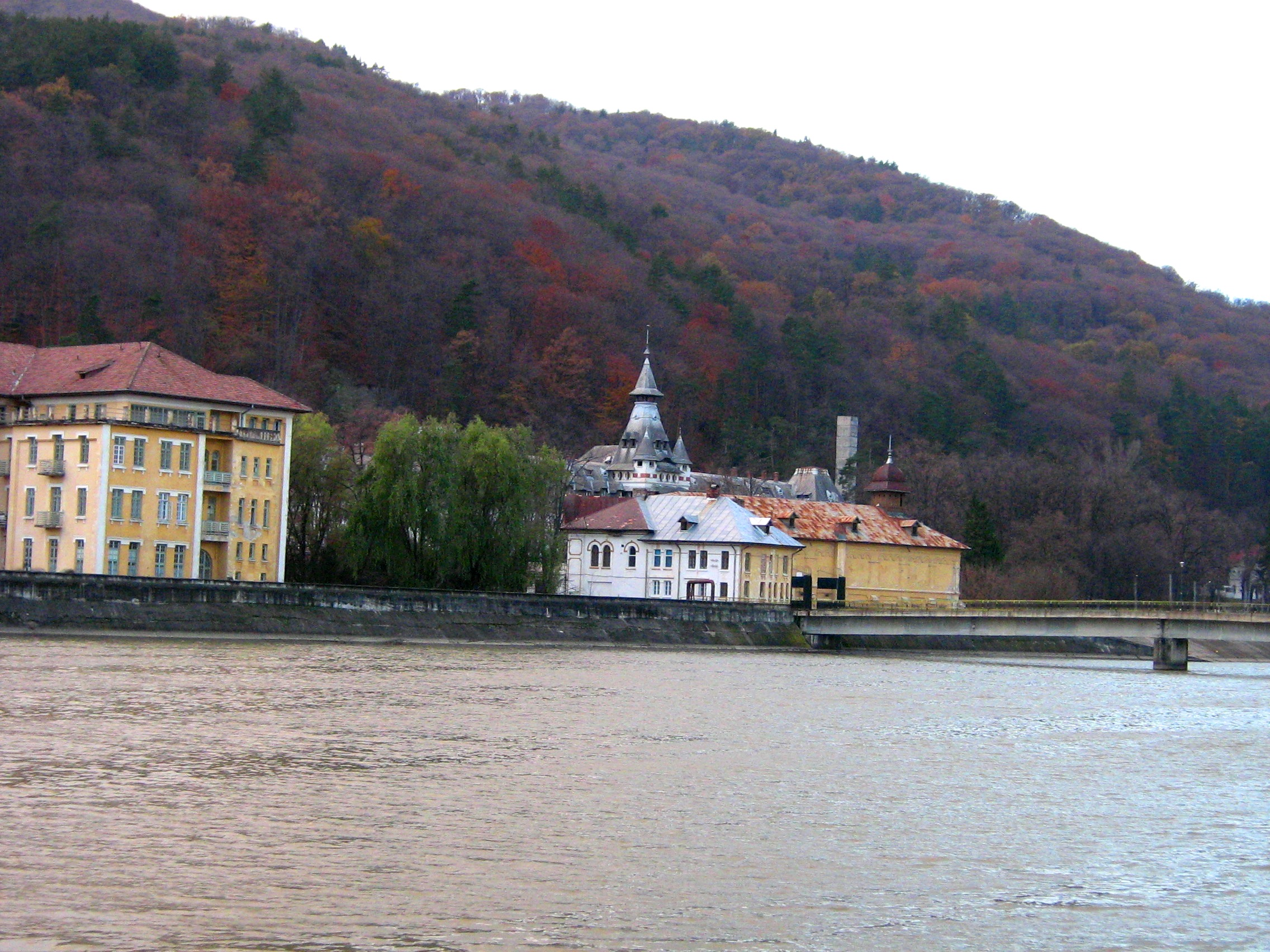 Calimanesti - Pavilionul Central.